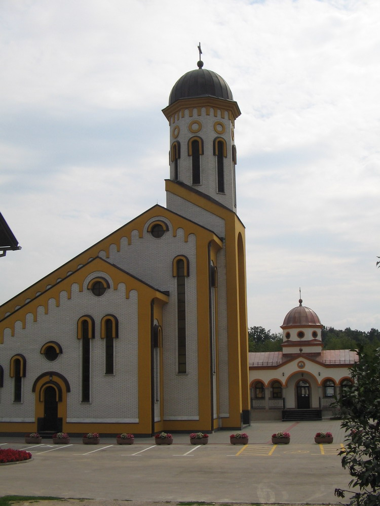 Crkva Sv. velikomučenika Georgija u naselju Drakulić